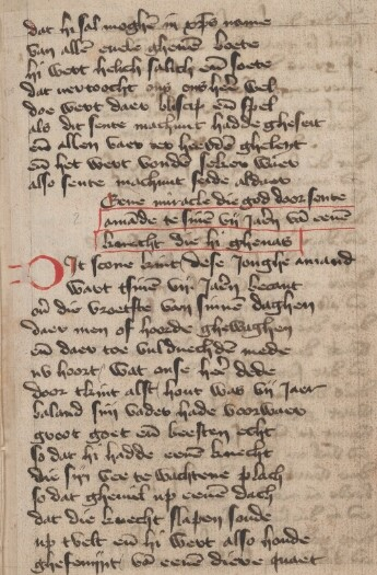 Fragment uit het manuscript "Leven van St.-Amandus". Geschreven door Gilles de Wevel in Vlaanderen, midden 15e eeuw.